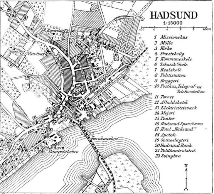 Kort over Hadsund 1923.